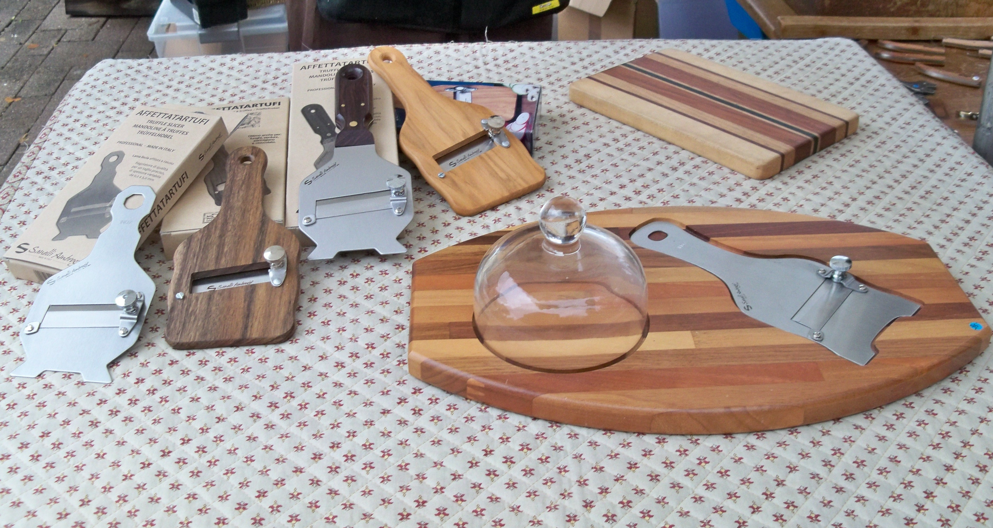 rape à truffes